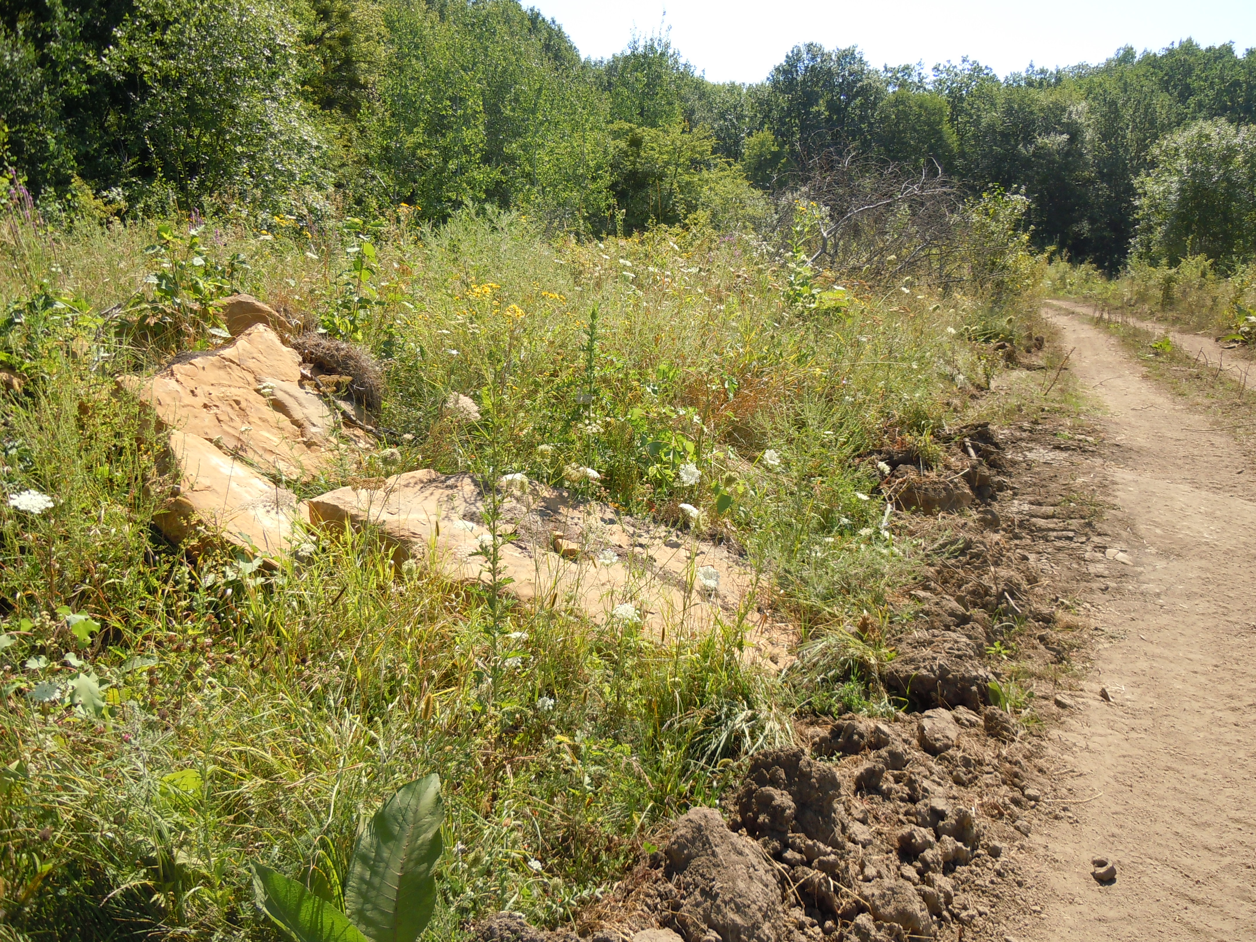 Плиты дольмена, перемещённые лесозаготовителями. Адыгея, Богатырская поляна, 2014 г.